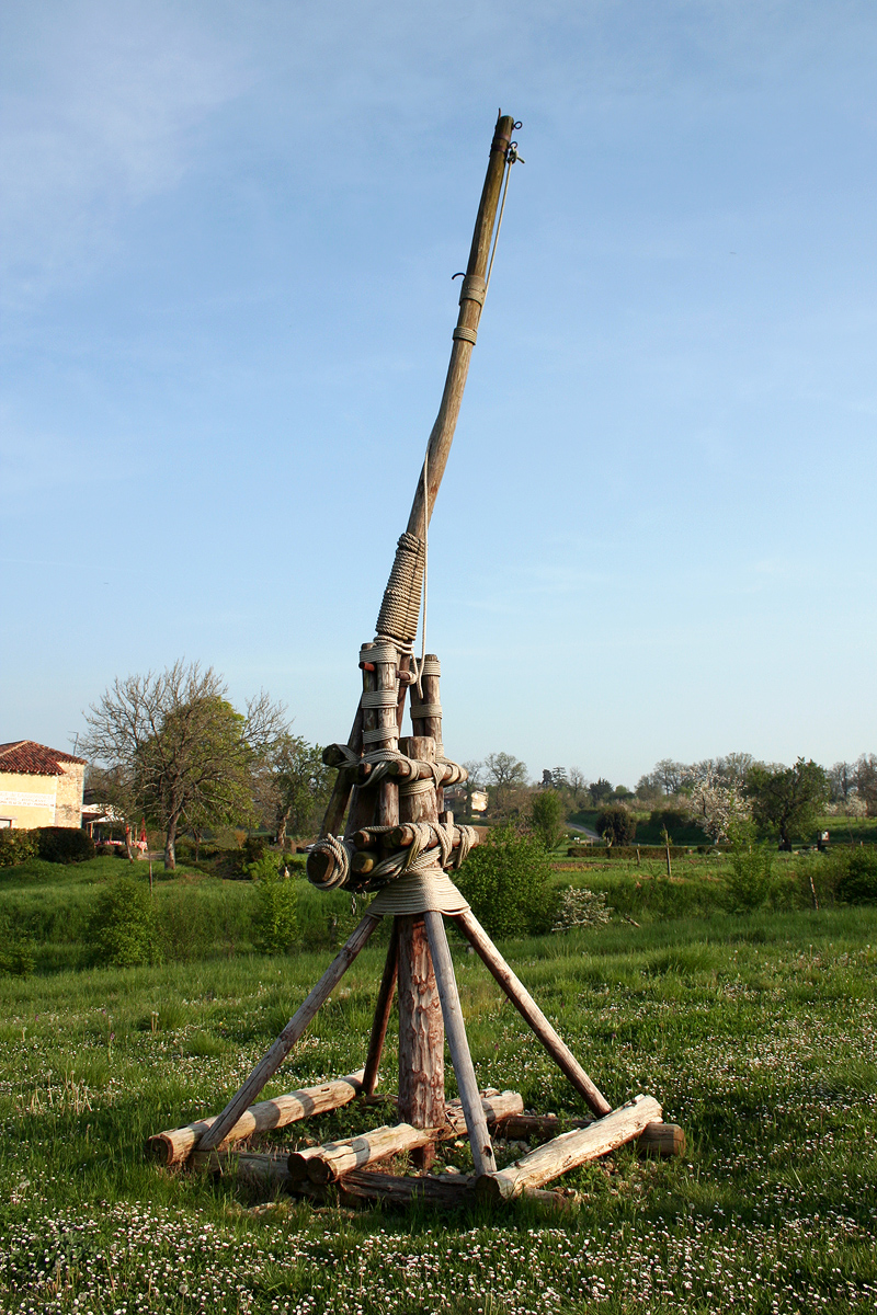 a re-built pierrière from the "City of the machines", in Larressingle, (Gers, France). Reconstitution d'une pierrière médiévale, «Cité des machines», Larressingle (Gers).